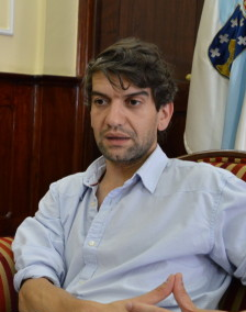 Jorge Suárez, alcalde de Ferrol.